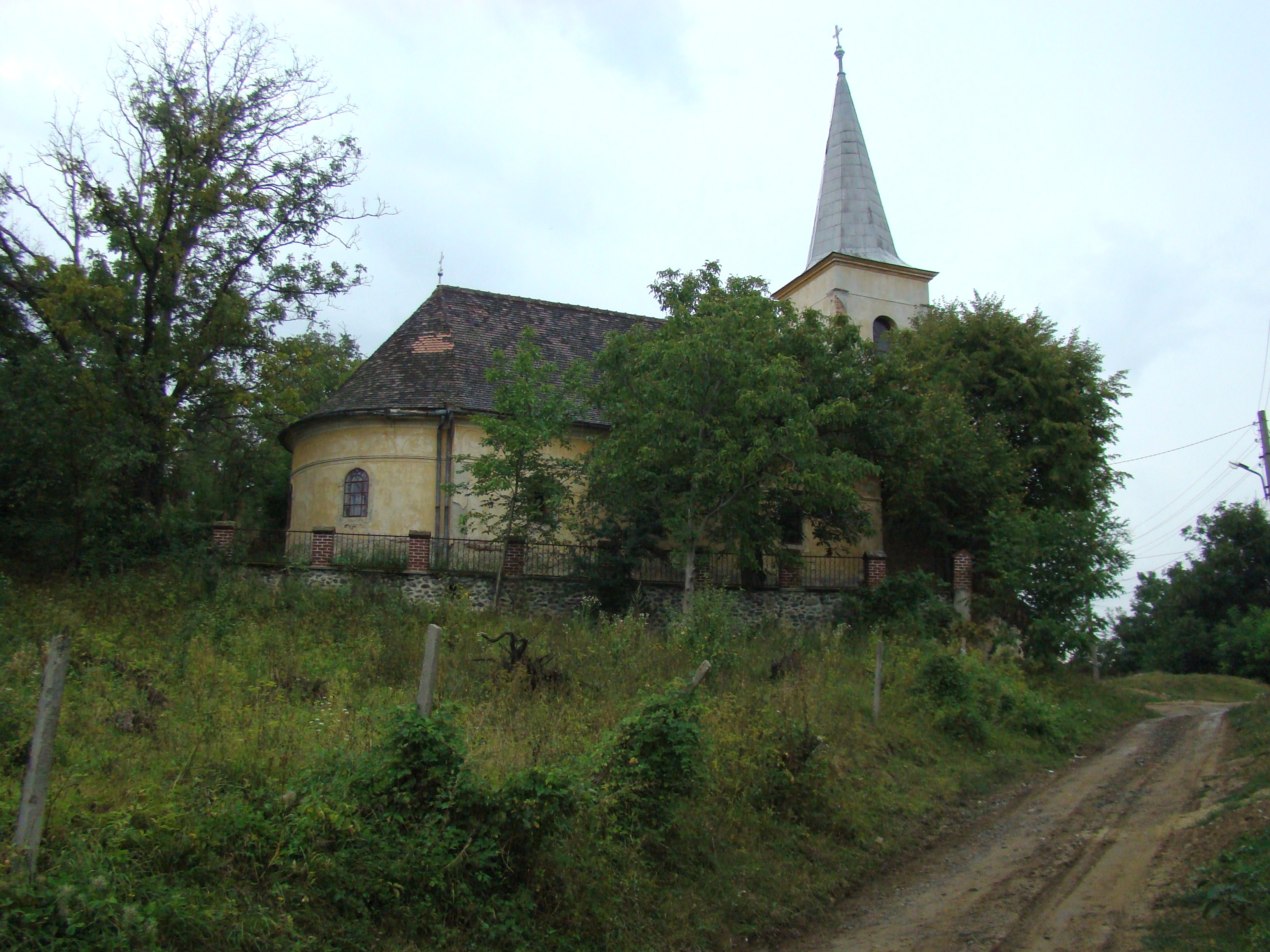 Biserica "Sfinții Arhangheli", sat Slimnic; comuna Slimnic